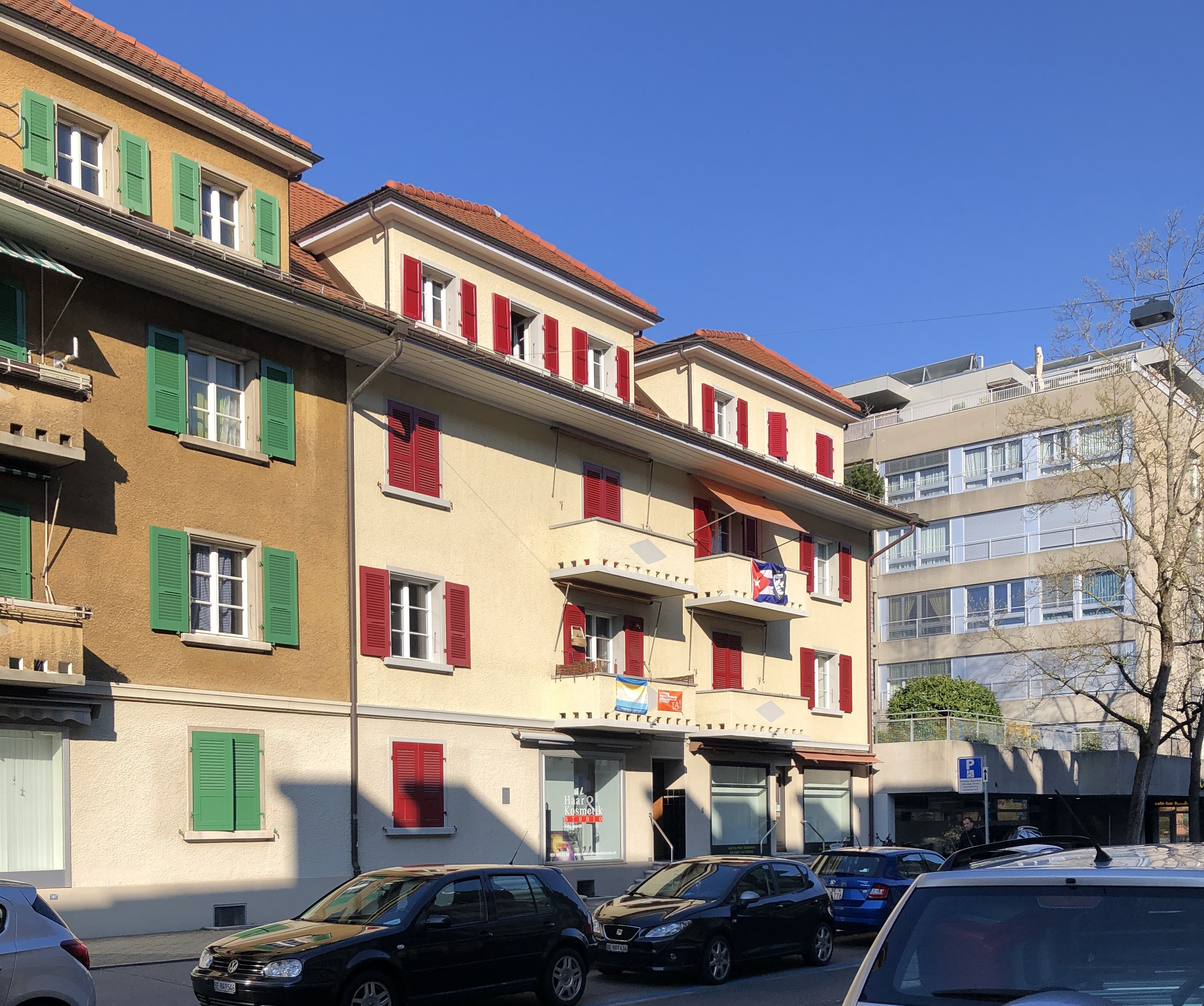 Stapfenacker Siedlung